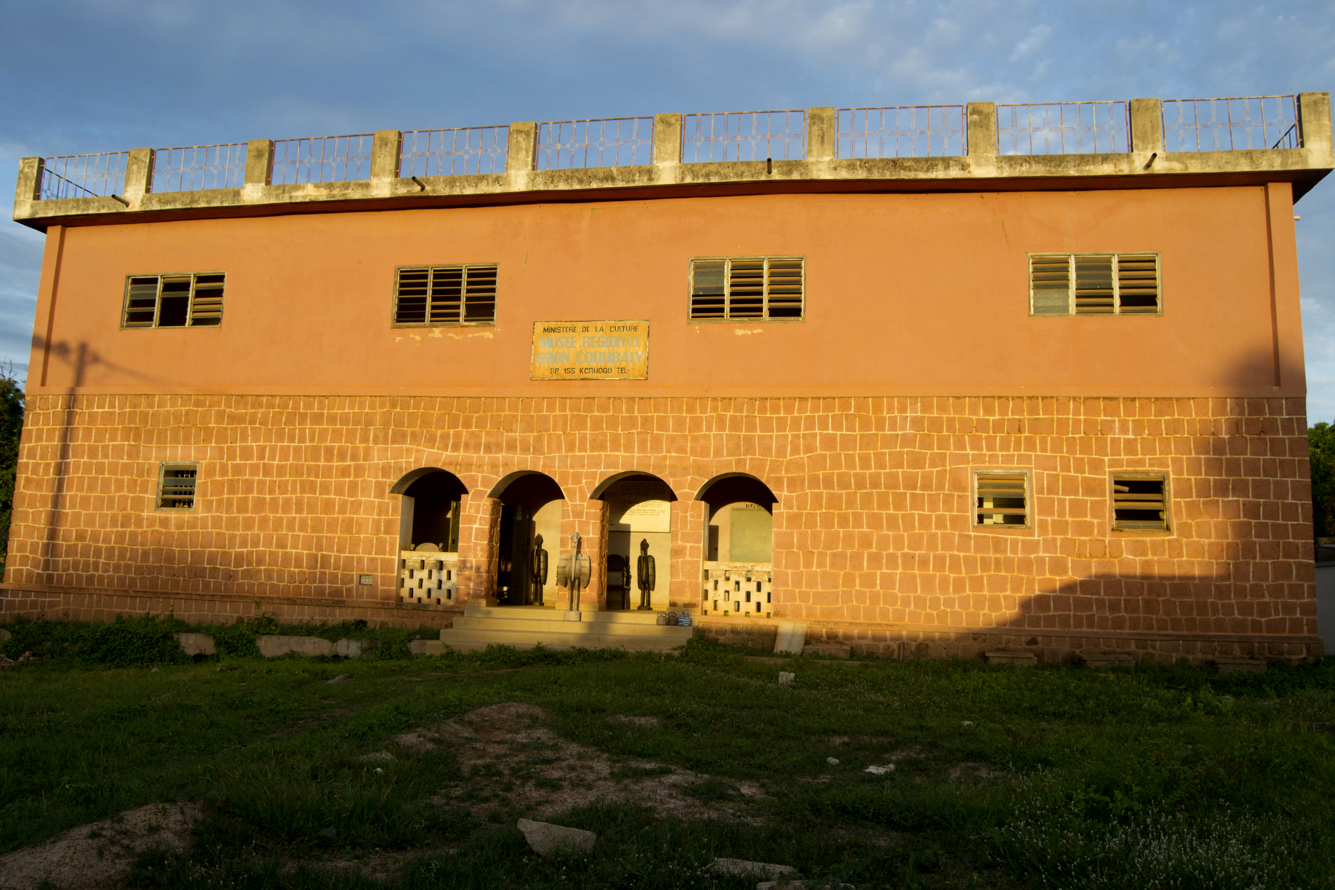 Achevé de construction en 1950, cet édifice qui dans son état actuel abrite le Musée régional de Korhogo, fut la résidence du patriarche PELEFORO SORO GBON COULIBALY (chef de province de Korhogo de 1894 à 1962) jusqu'à sa mort en 1962.